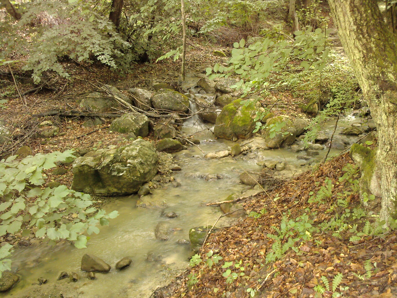 Părău Cărâmbaşului, Măgura Priei, Judeţul Sălaj